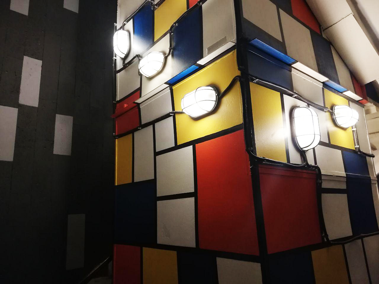 Арт-объект на территории центра дизайна Artplay